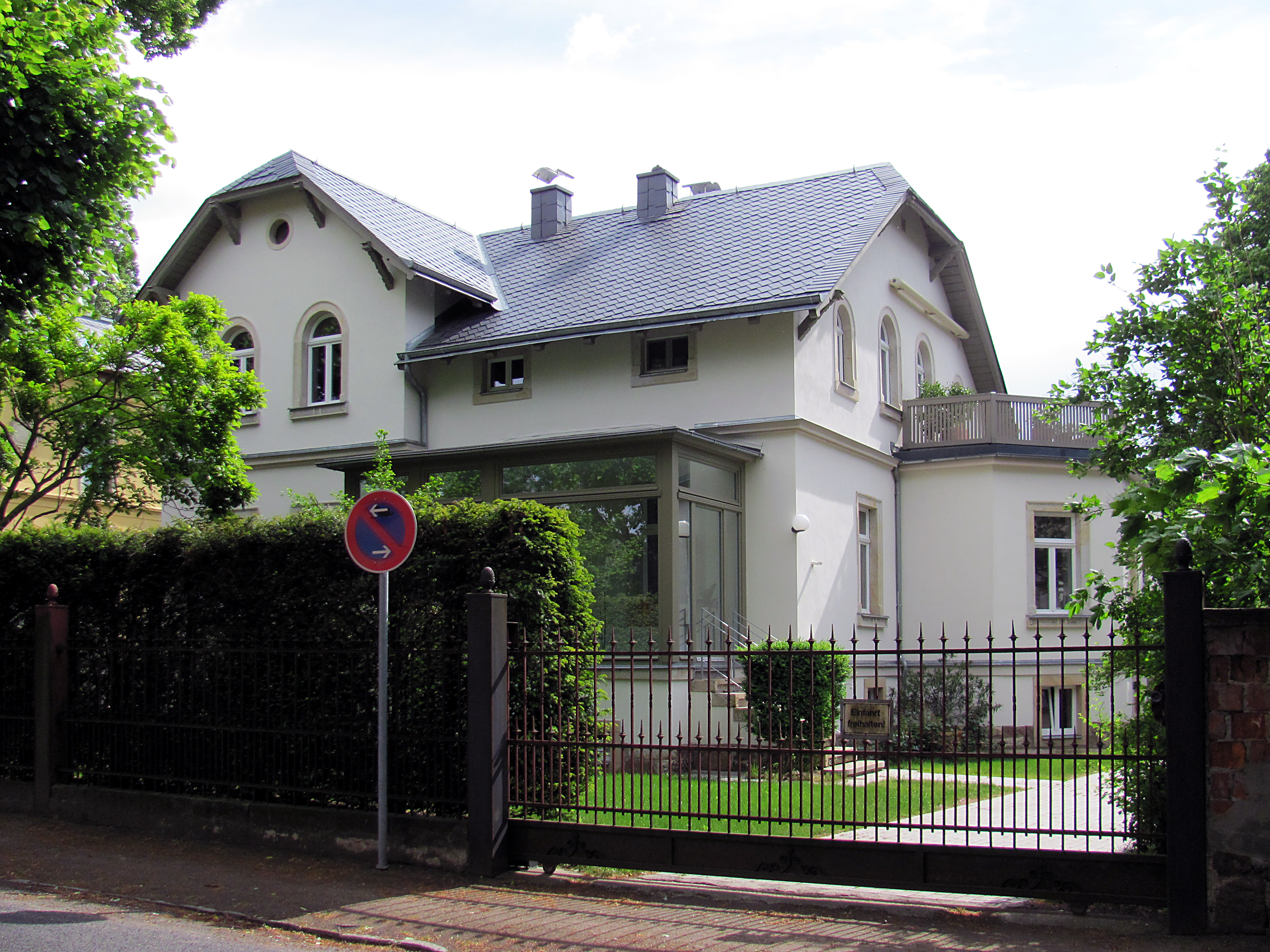 Radebeul-Niederlößnitz, Mietvilla Wilhelm-Busch-Straße 10